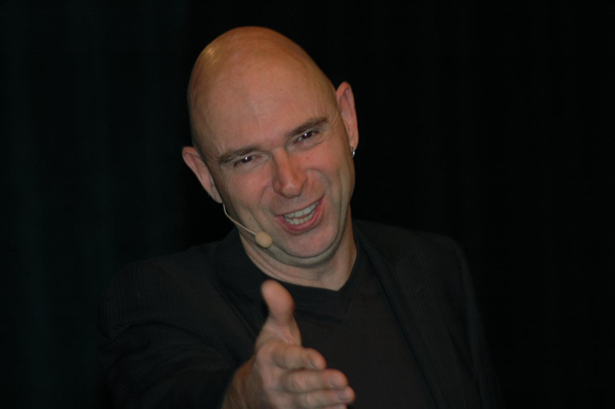 Frank Sauer bei einem Auftritt auf der Freiburger Kulturbörse 2009